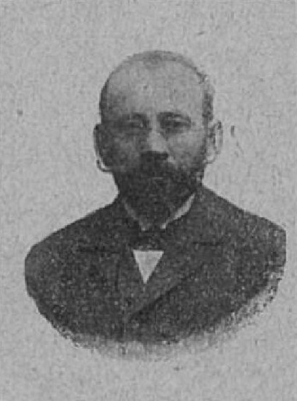 Jan Barták (1861-1941), rakouský a český politik